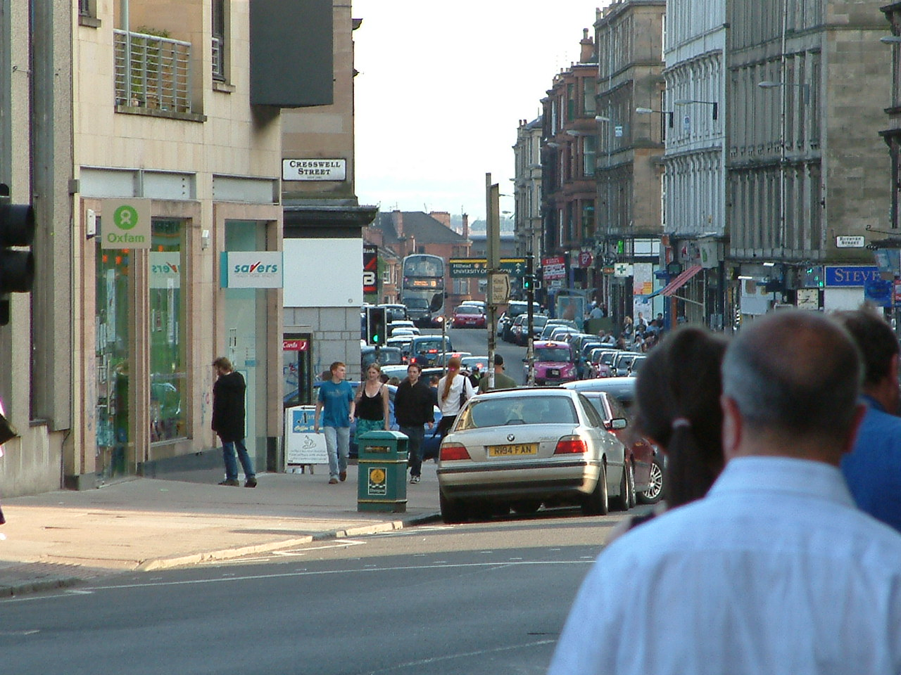 vlastni foto